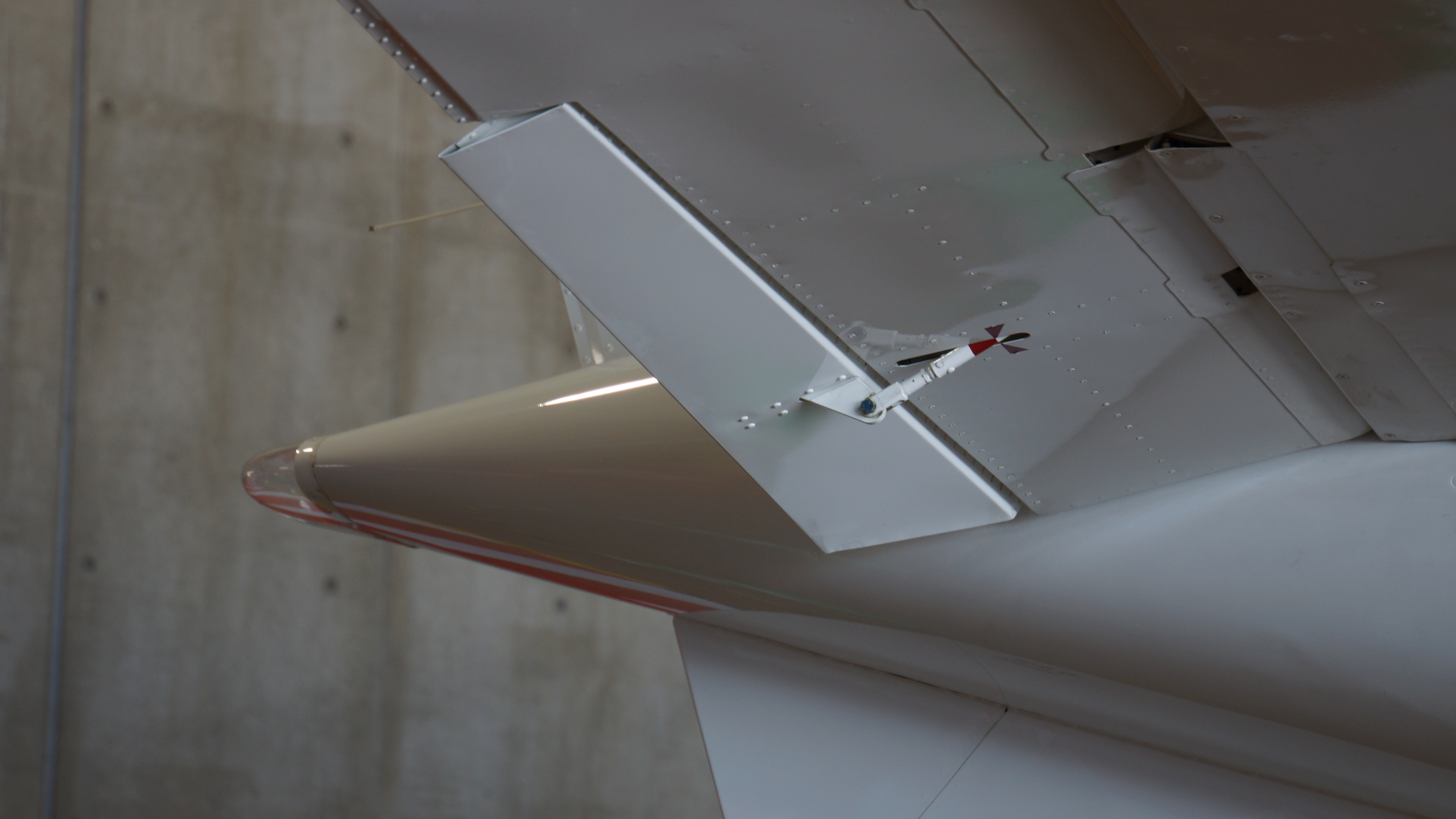 海上自衛隊 TC-90練習機（6832号機） 昇降舵タブ（右尾翼側） ローアングル。2017年9月30日 徳島航空基地にて。